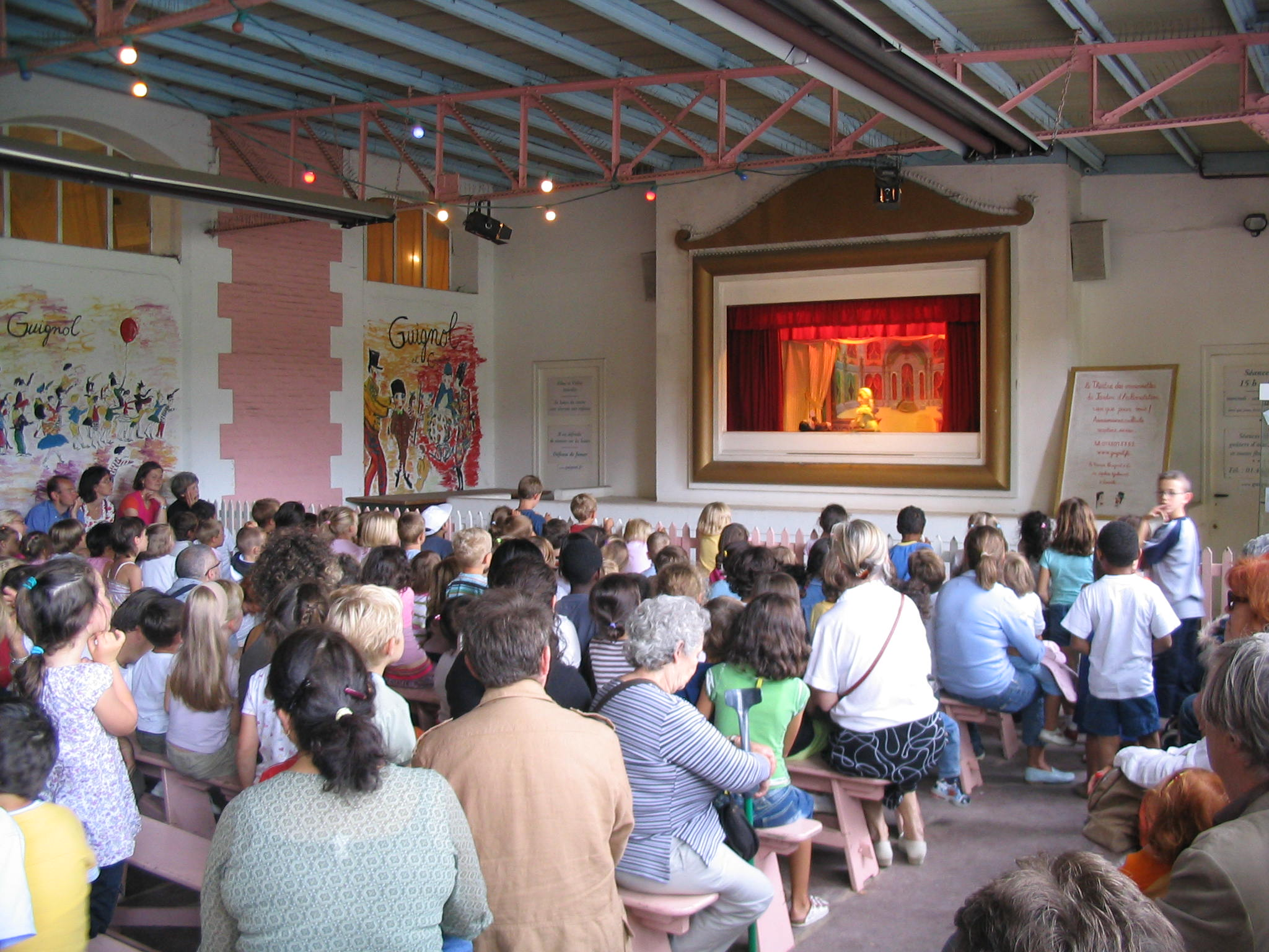 Représentation de théatre de Guignol, à Paris, dans le Jardin d'Acclimatation. Photographie personnelle réalisée en septembre 2006.